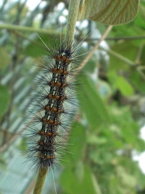 クワゴマダラヒトリ（Lemyra imparilis）の幼虫、神奈川県逗子市。